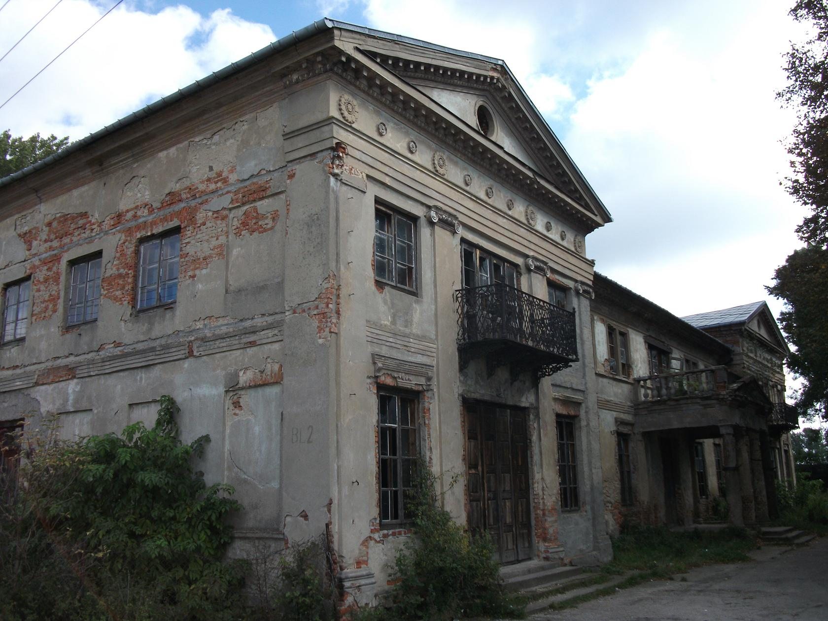 Zabytkowy dwór w Rudzie k/Wielunia 09.1988.